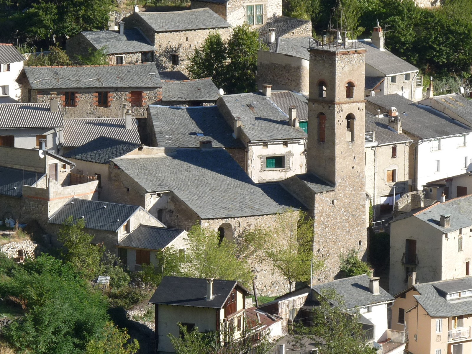 Eglise de Fontpédrouse, Pyrénées-Orientales, France